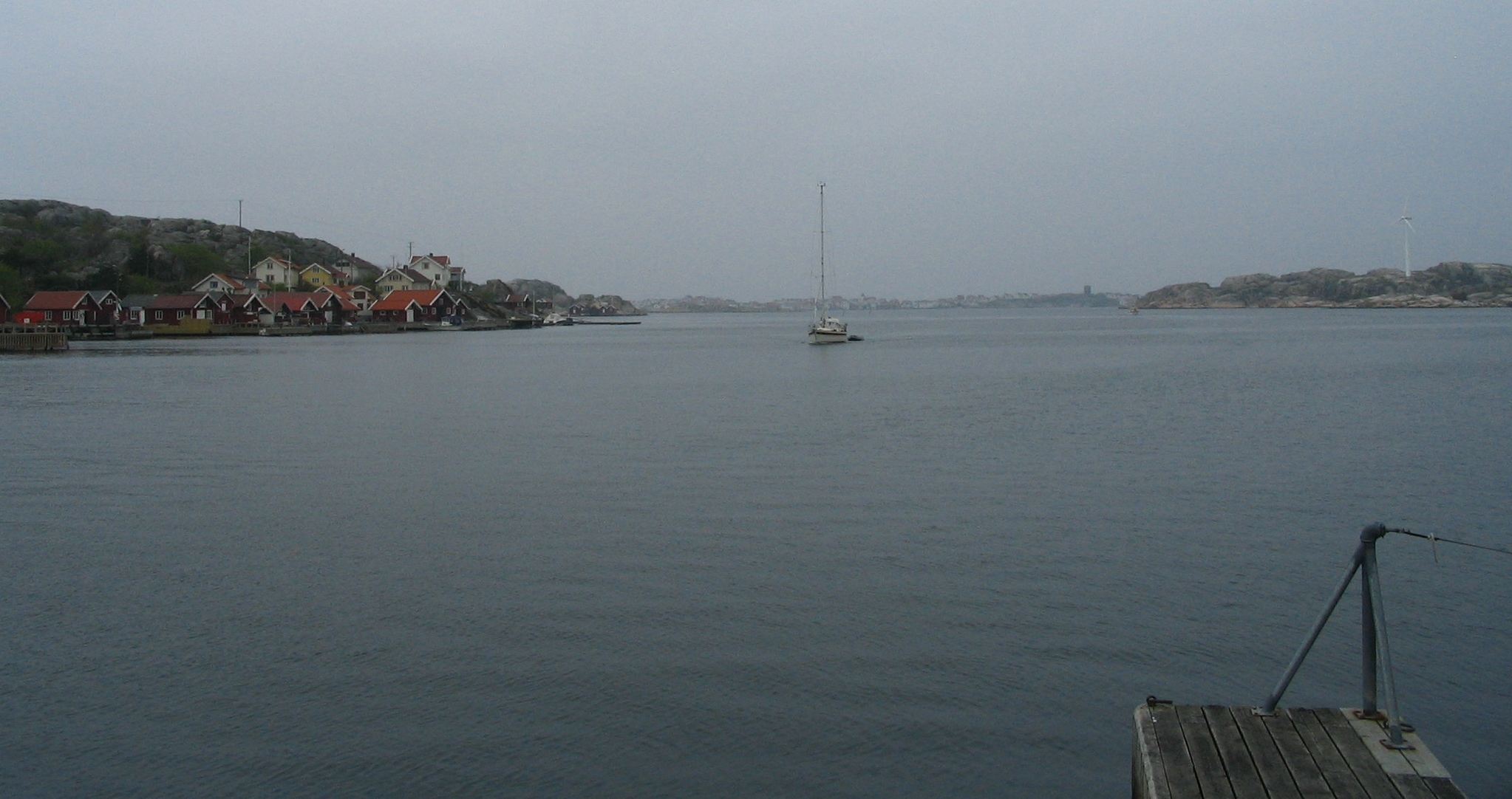 Village Rönnäng on Tjörn island, Sweden